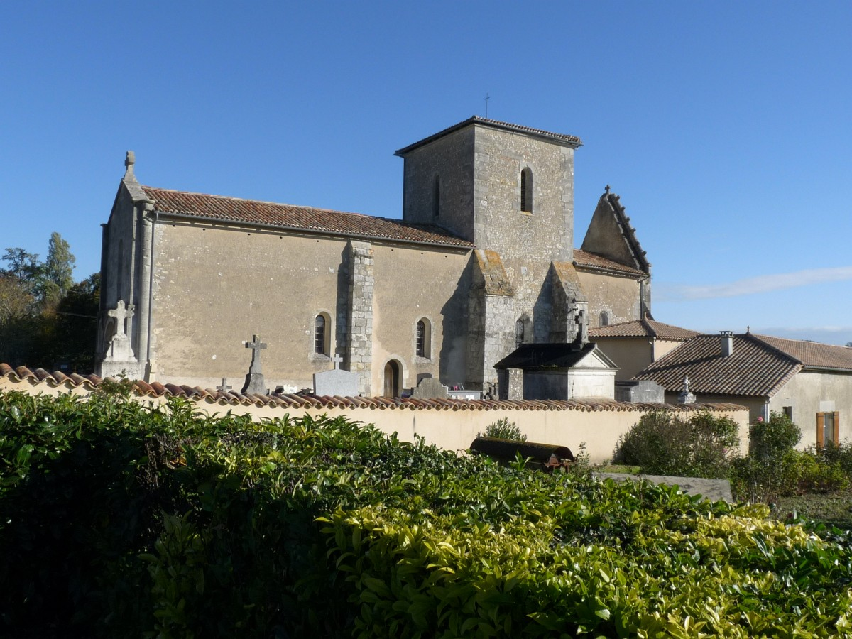 Eglise de Chatenet, Charente-Maritime, France